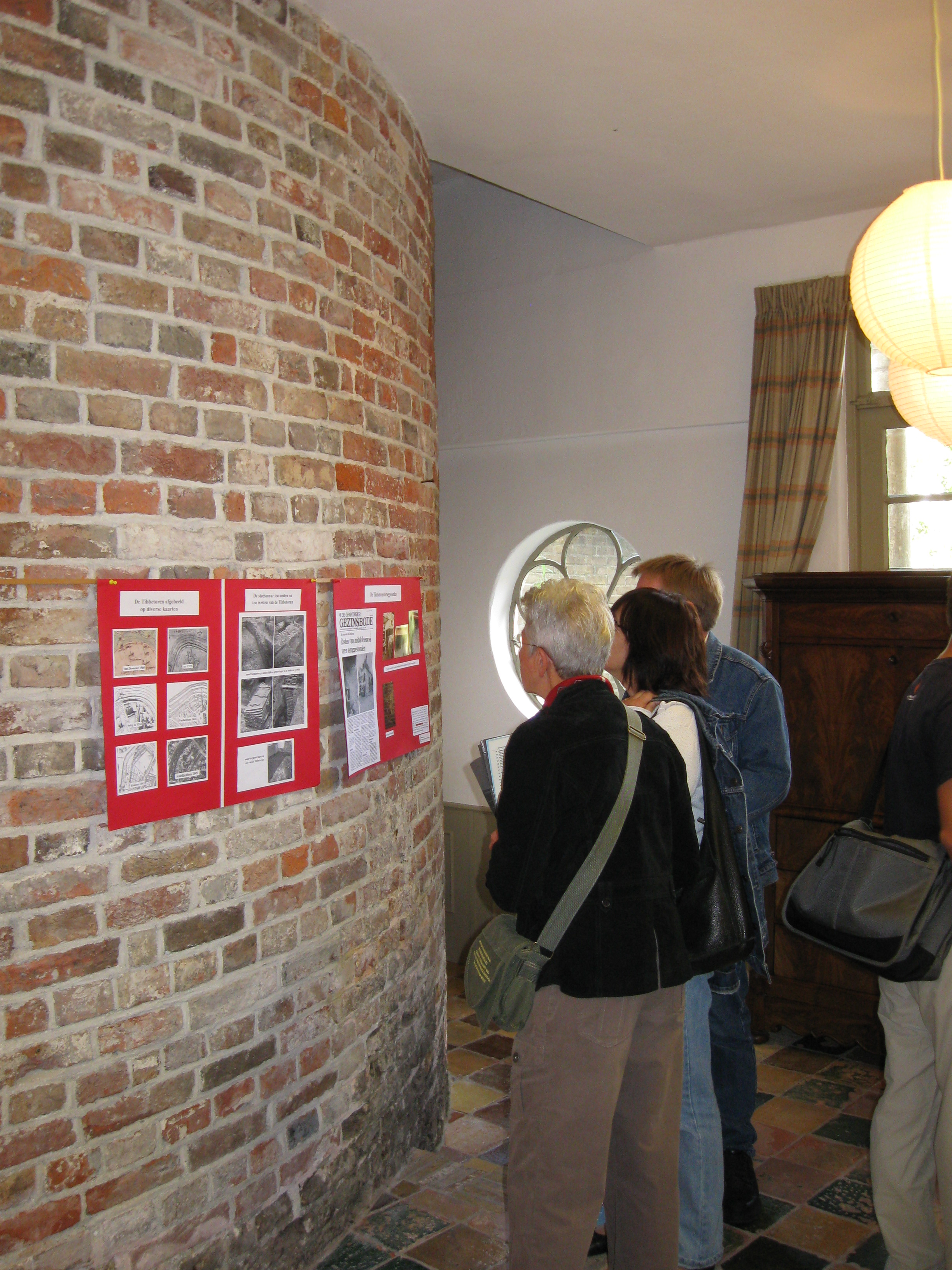 Groningen, Hofstraat 36, Tebbetoren, restant als onderdeel woonhuis